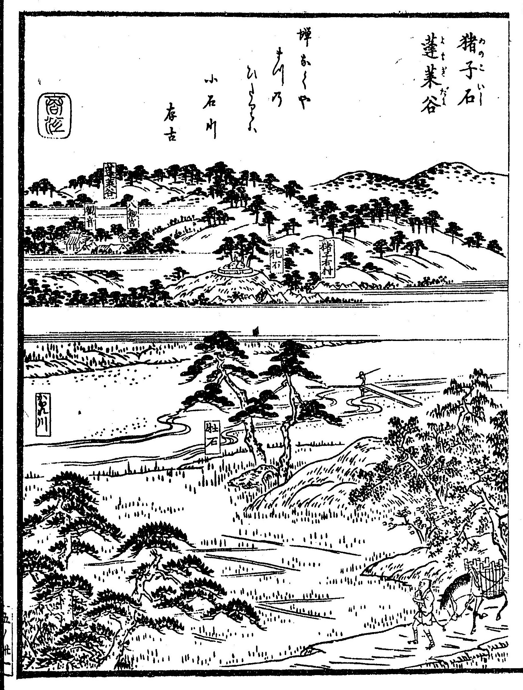 尾張名所図会 前編 巻5 愛智郡「猪子石・蓬来谷」